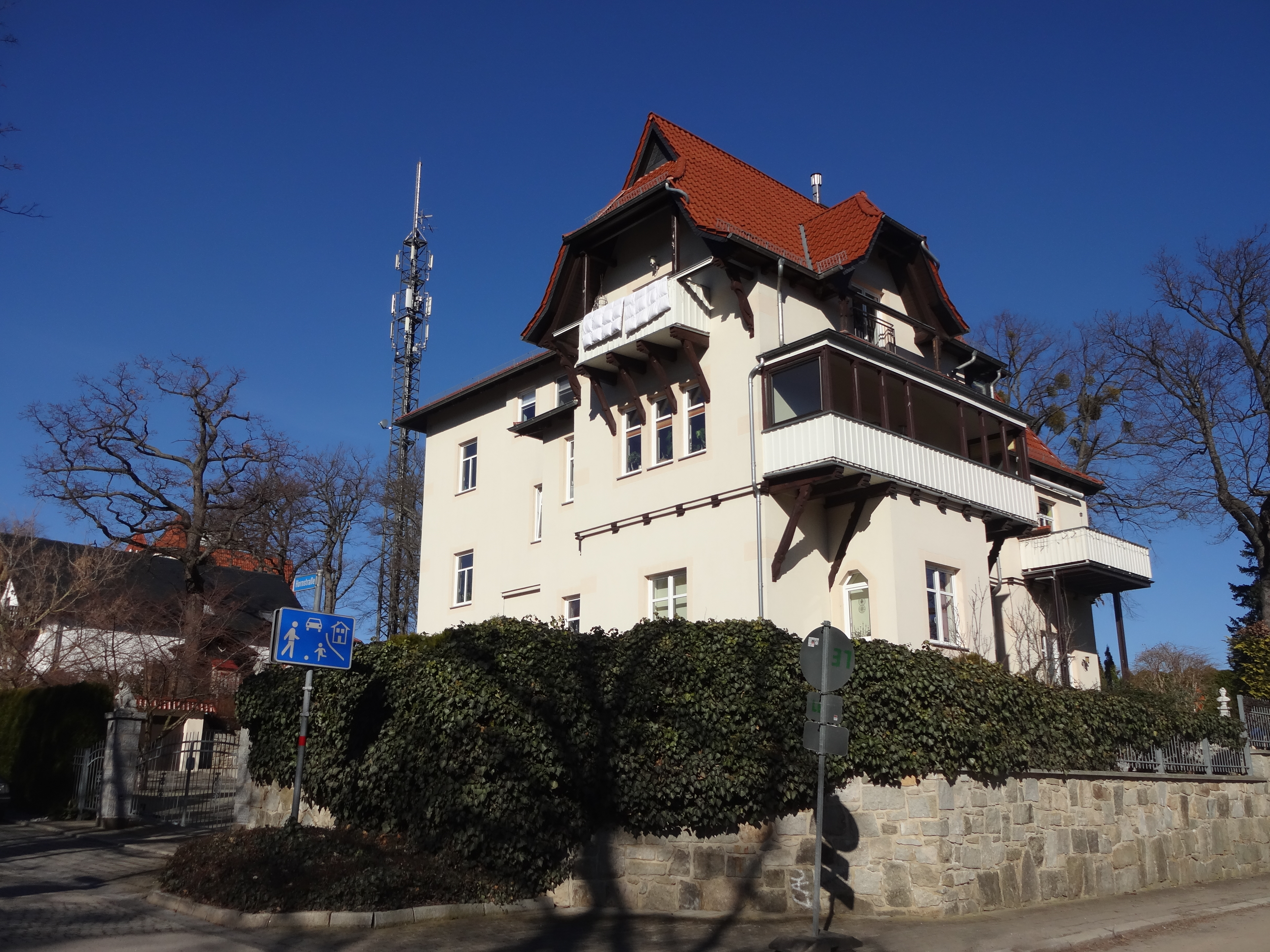 ehemals denkmalgeschützte Villa in der Hornstraße 4 in Wernigerode